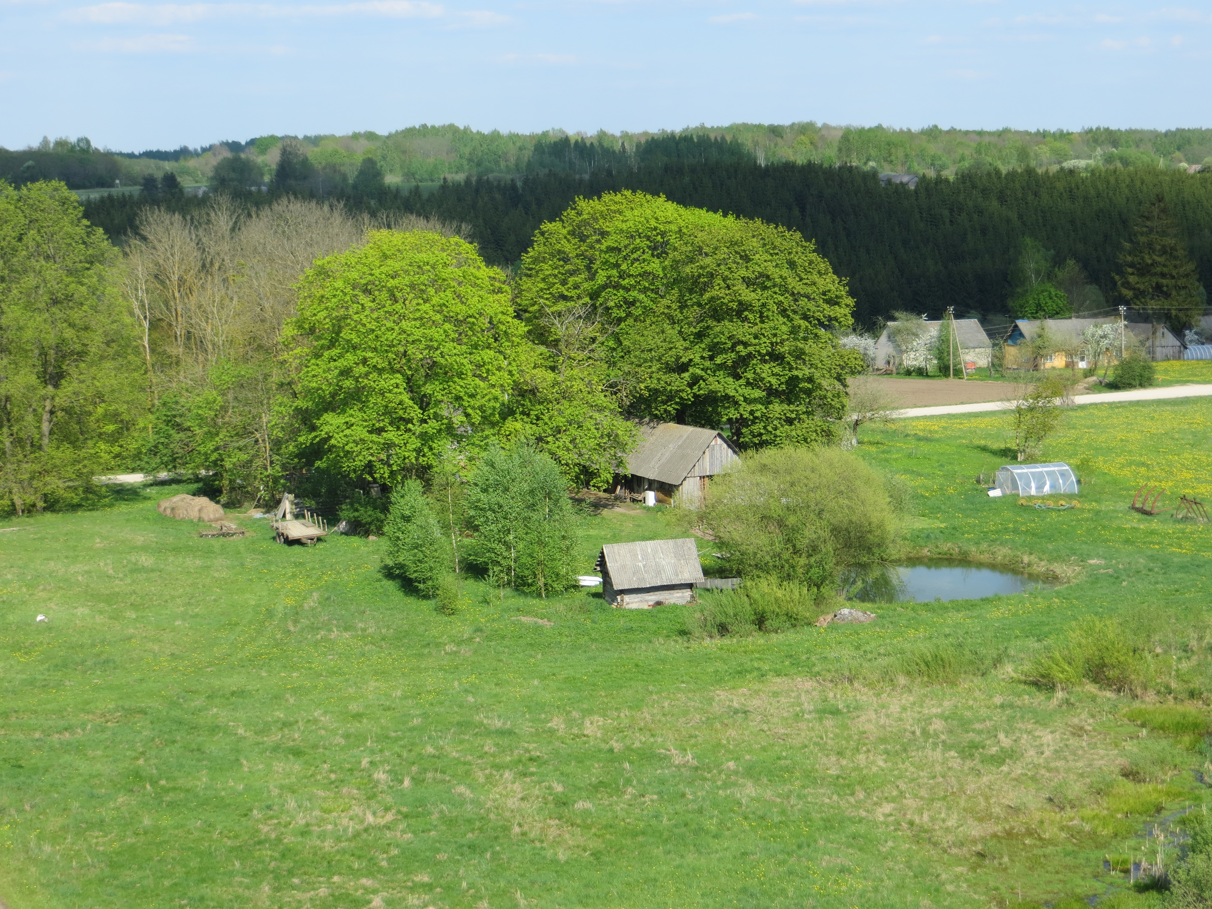 Kurklių sen., Lithuania